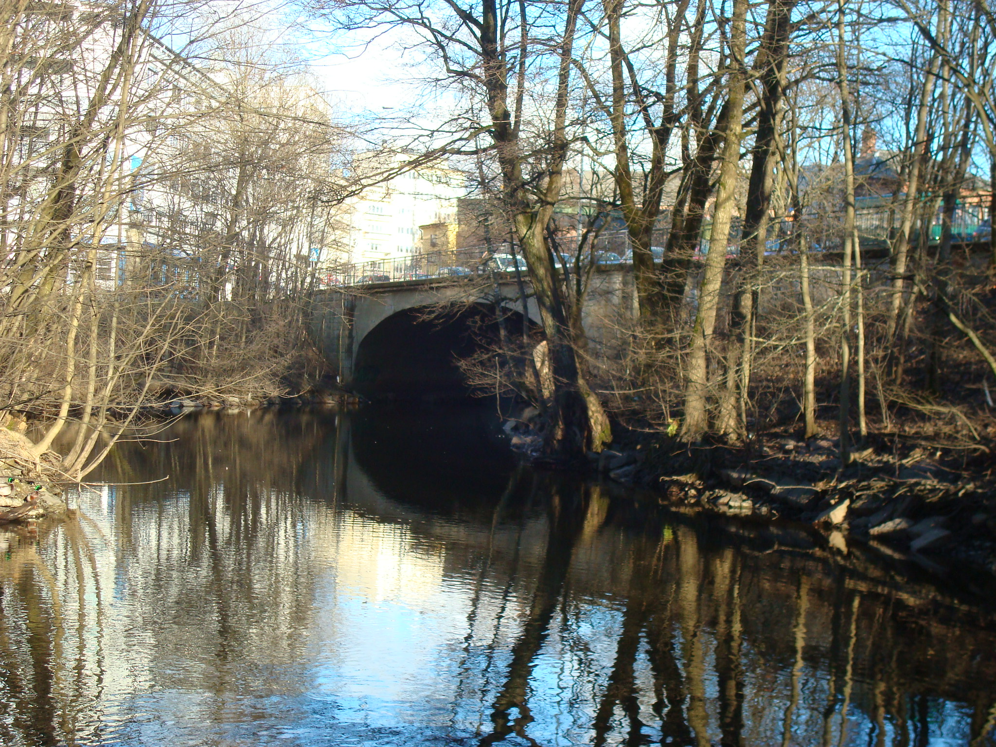 Treschows bru i Oslo, sett nedover elven.